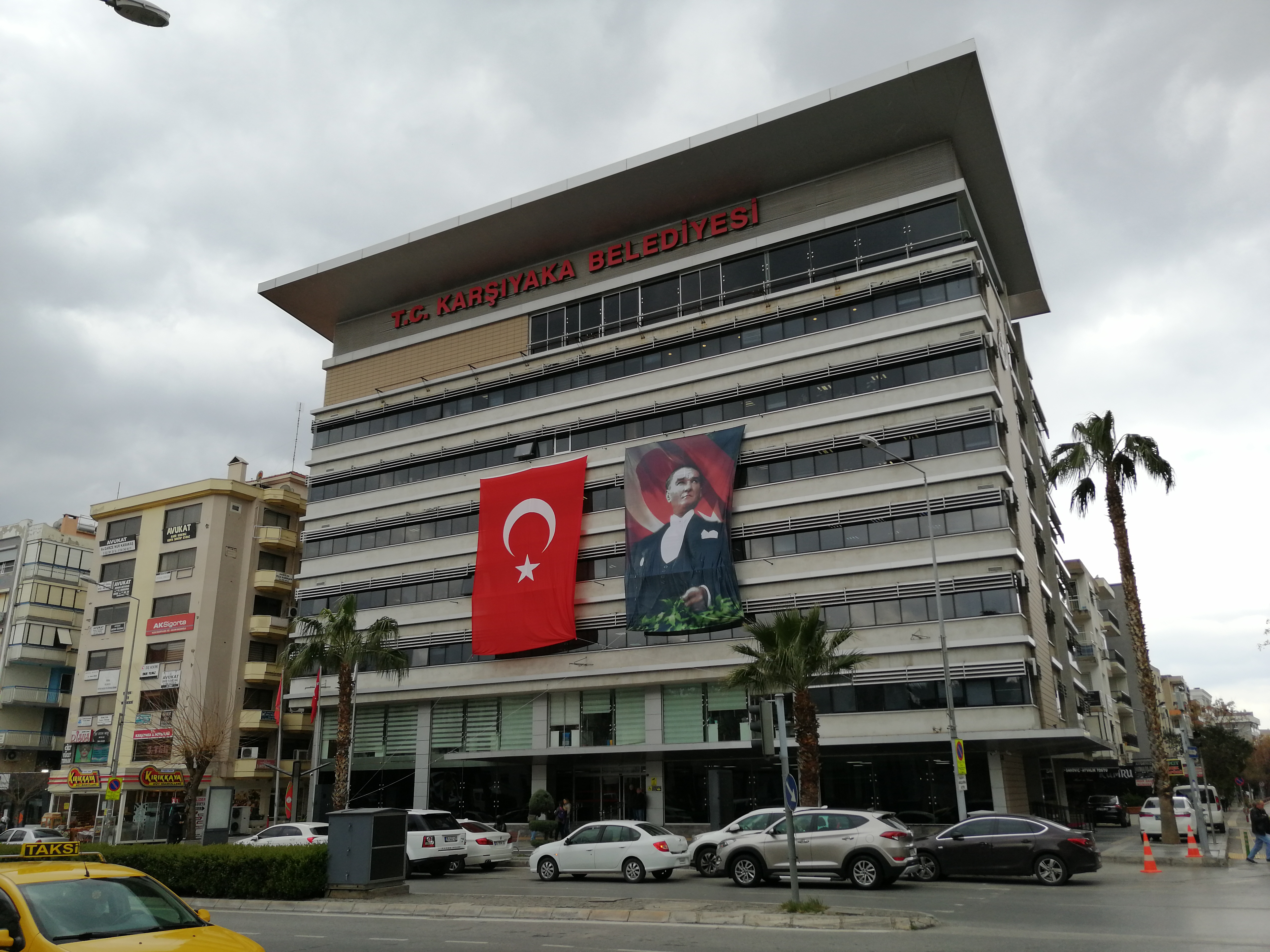 Belediye binası